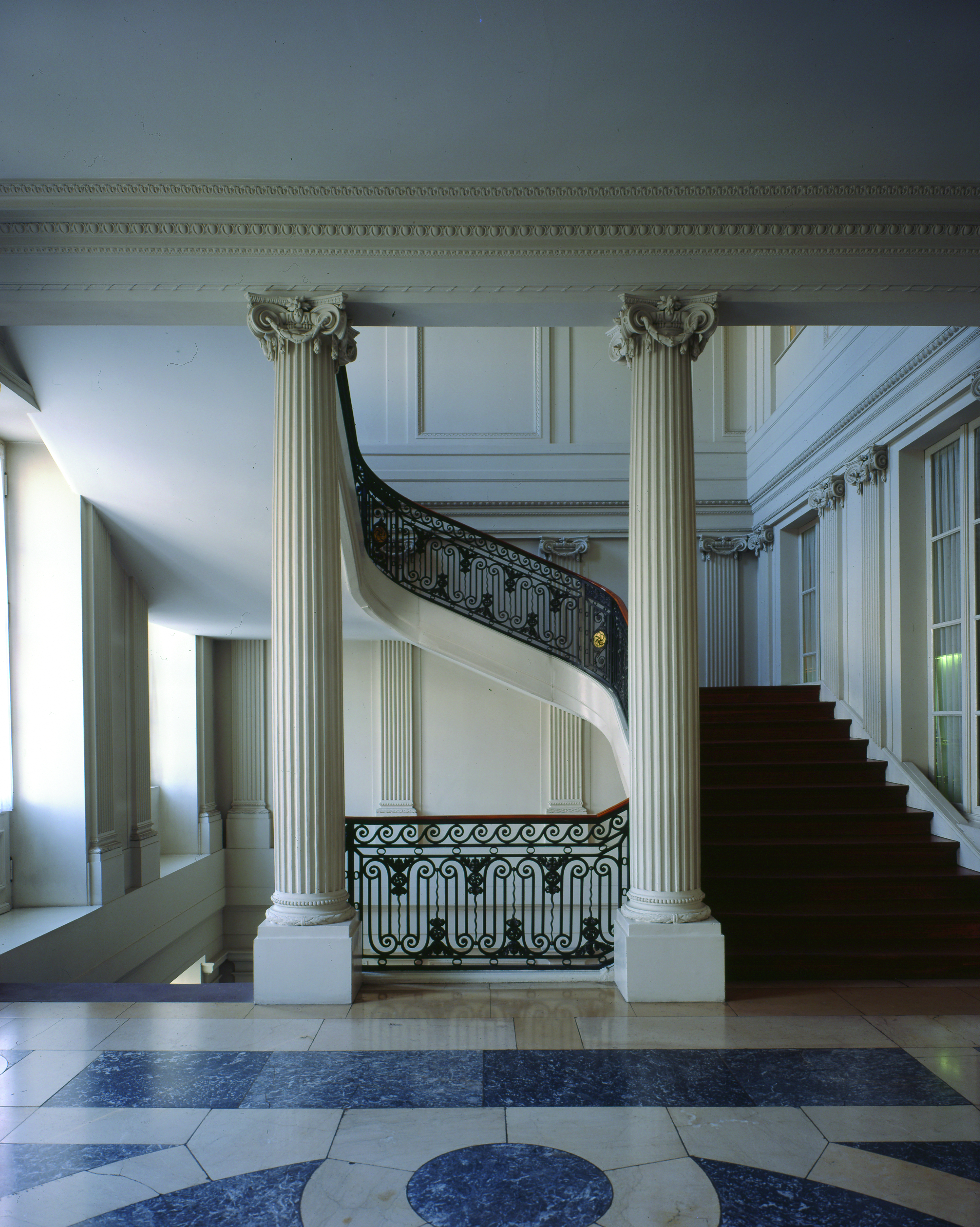 LangSwitch Error: no default